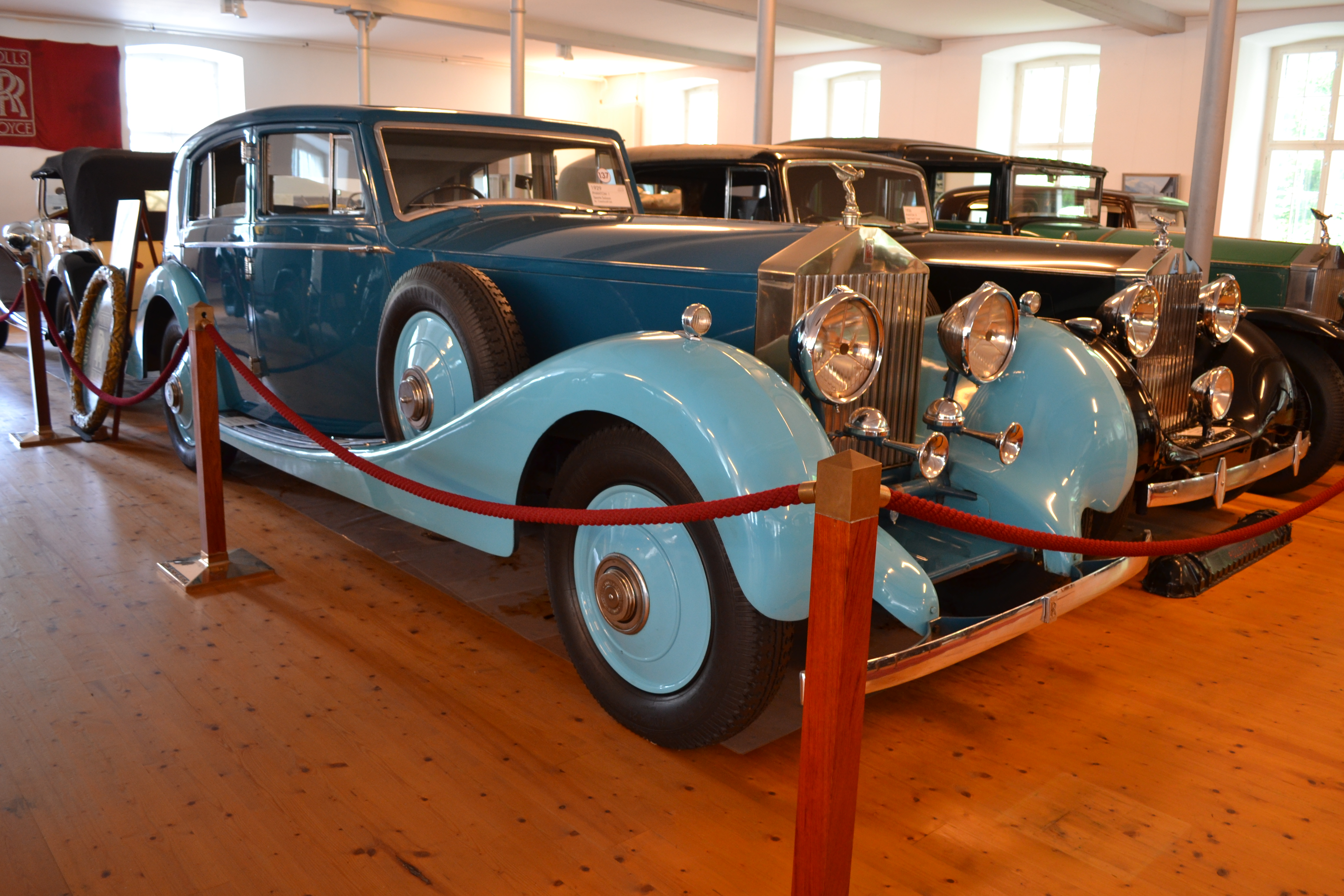 A Rolls-Royce Múzeum Dornbirnben